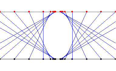 Ďalšií spôsob, ako si predstaviť projektívnu priamku